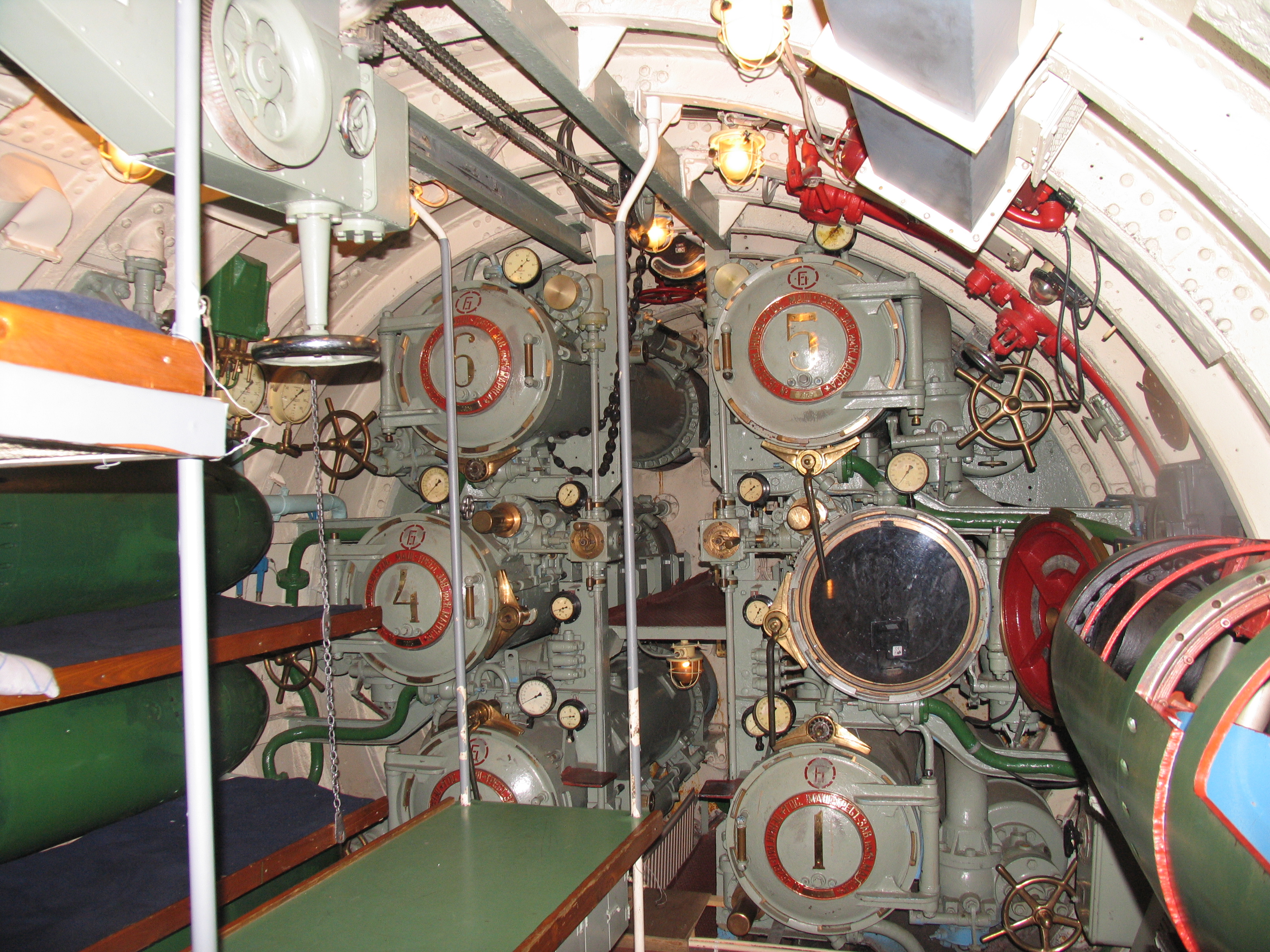 Подводная лодка Д-2 «Народоволец». Первый отсек. Торпедные аппараты.